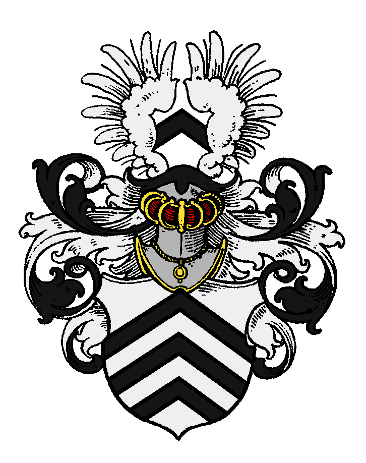 Stammwappen der von Rappe; in Preußen 1460; in Livland, Kurland 1624